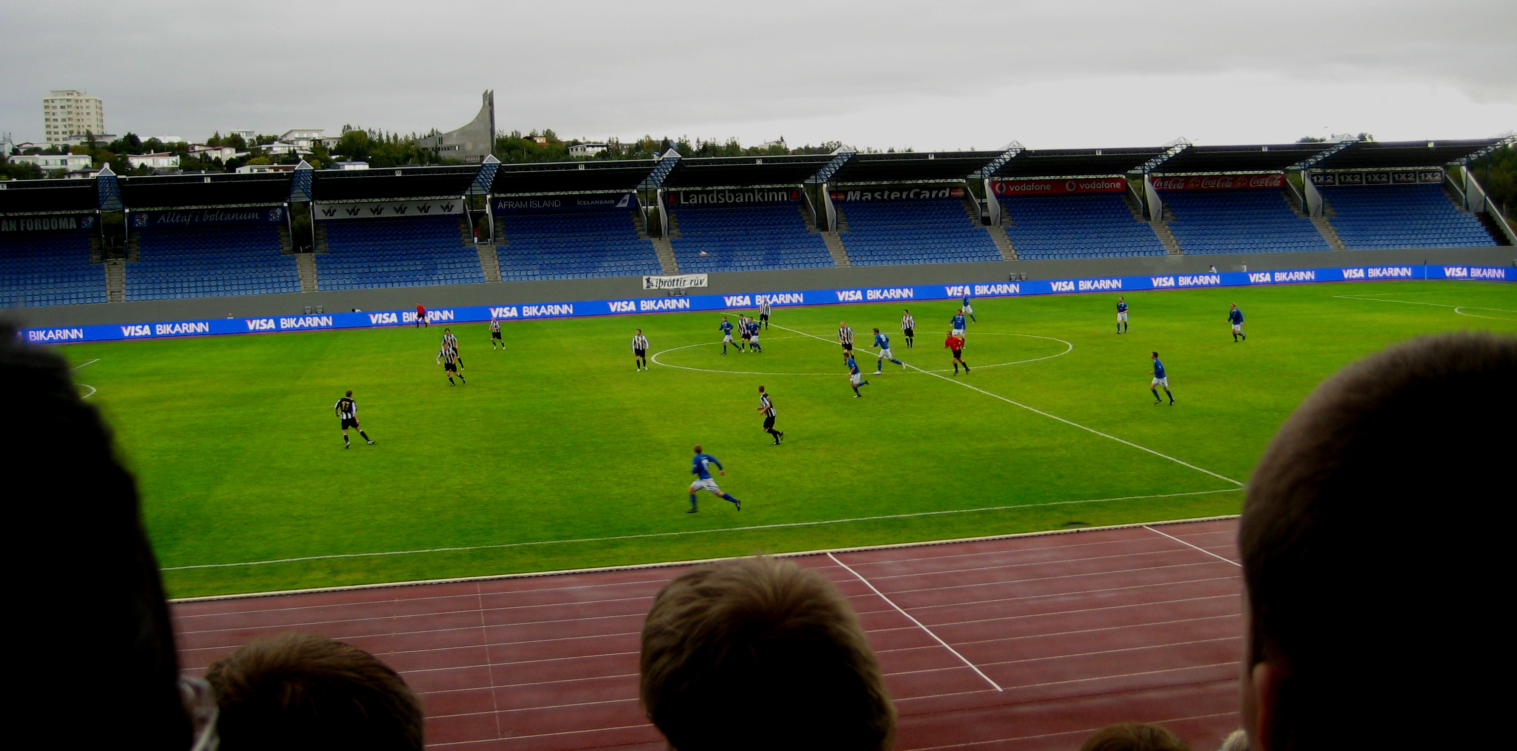 Fram - KR